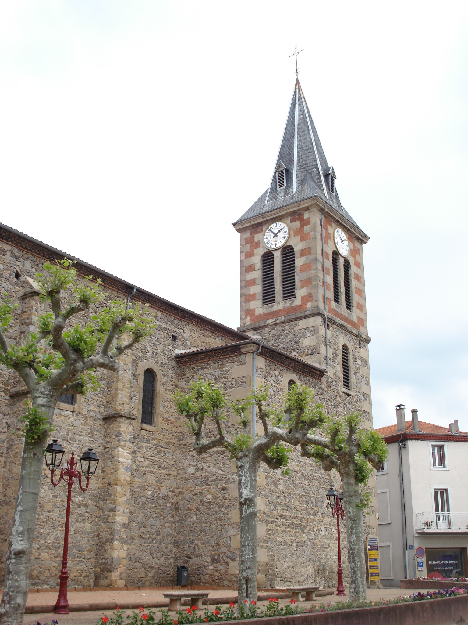 église de Saint-Uze dans la Drôme